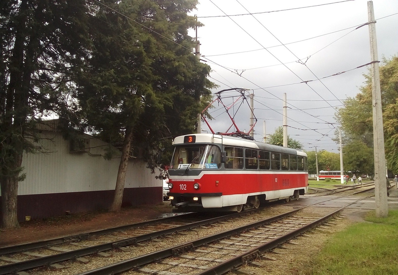 Трамвайный вагон с оборудованием Динас-309Т в Краснодаре